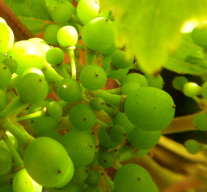 Trosje jonge druiven, gefotografeerd van korte afstand met een speelgoedlens